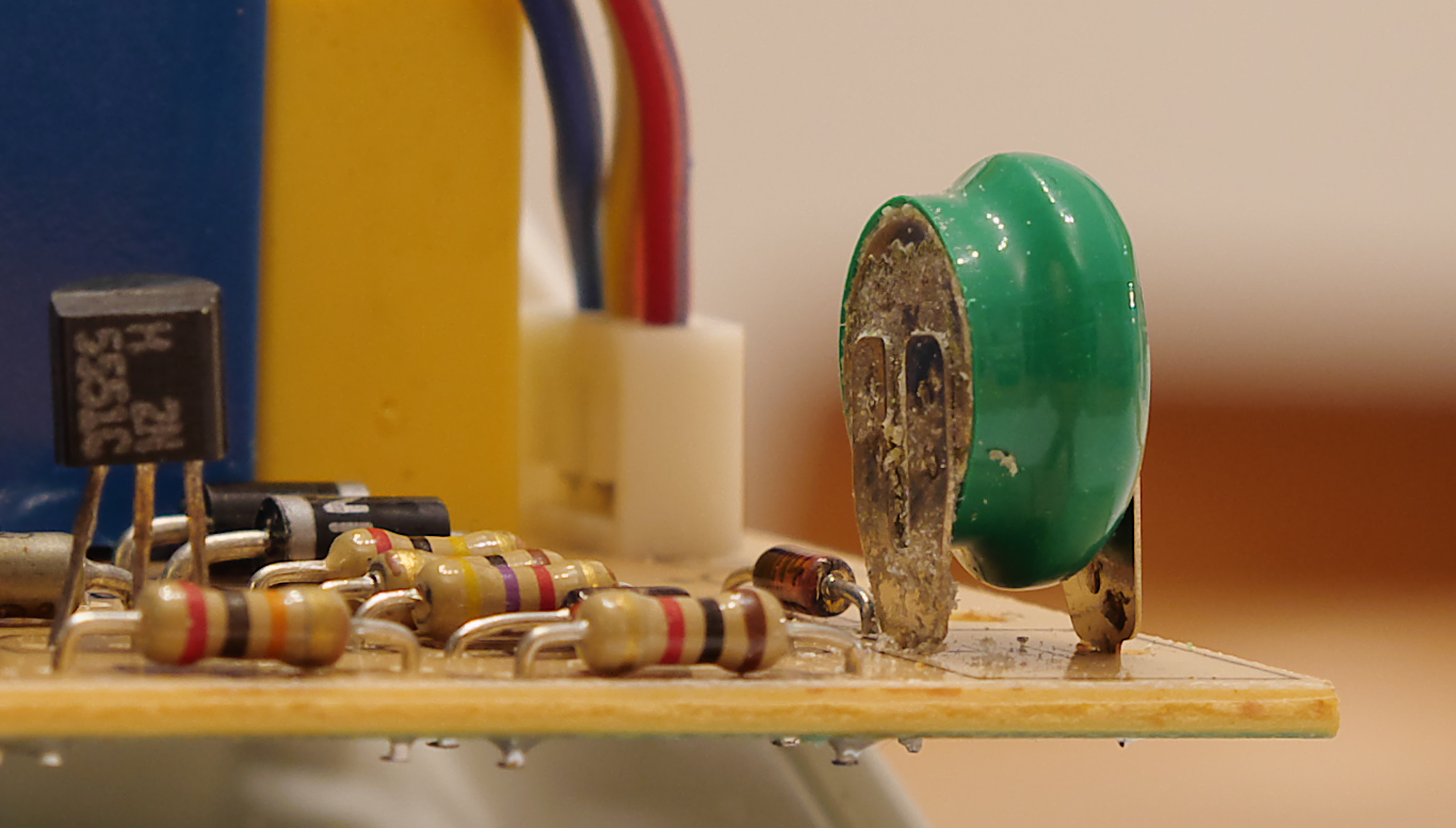 Gealterter 1,2-Volt-Knopfzellenakku mit grüner Schutzhülle zur Energiepufferung auf einer gedruckten Schaltung (rechts)